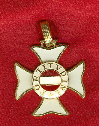 Eigen scan op rode zakdoek... Er berust op dit eeuwenoude ontwerp geen auteursrecht. Robert Prummel 5 jun 2006 22:06 (CEST)